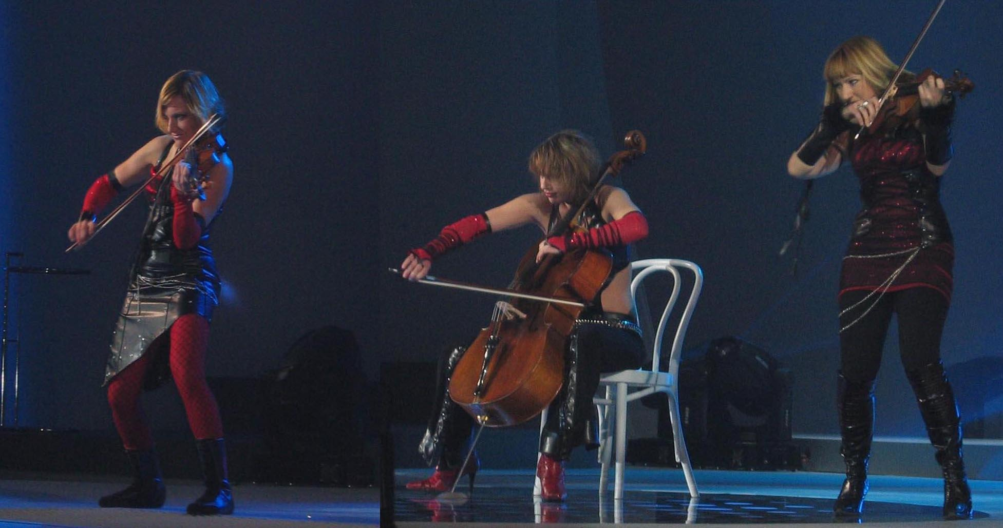 Rožmarinke, slovenian string ensemble photo:Ziga 10:07, 10 February 2007 (UTC)